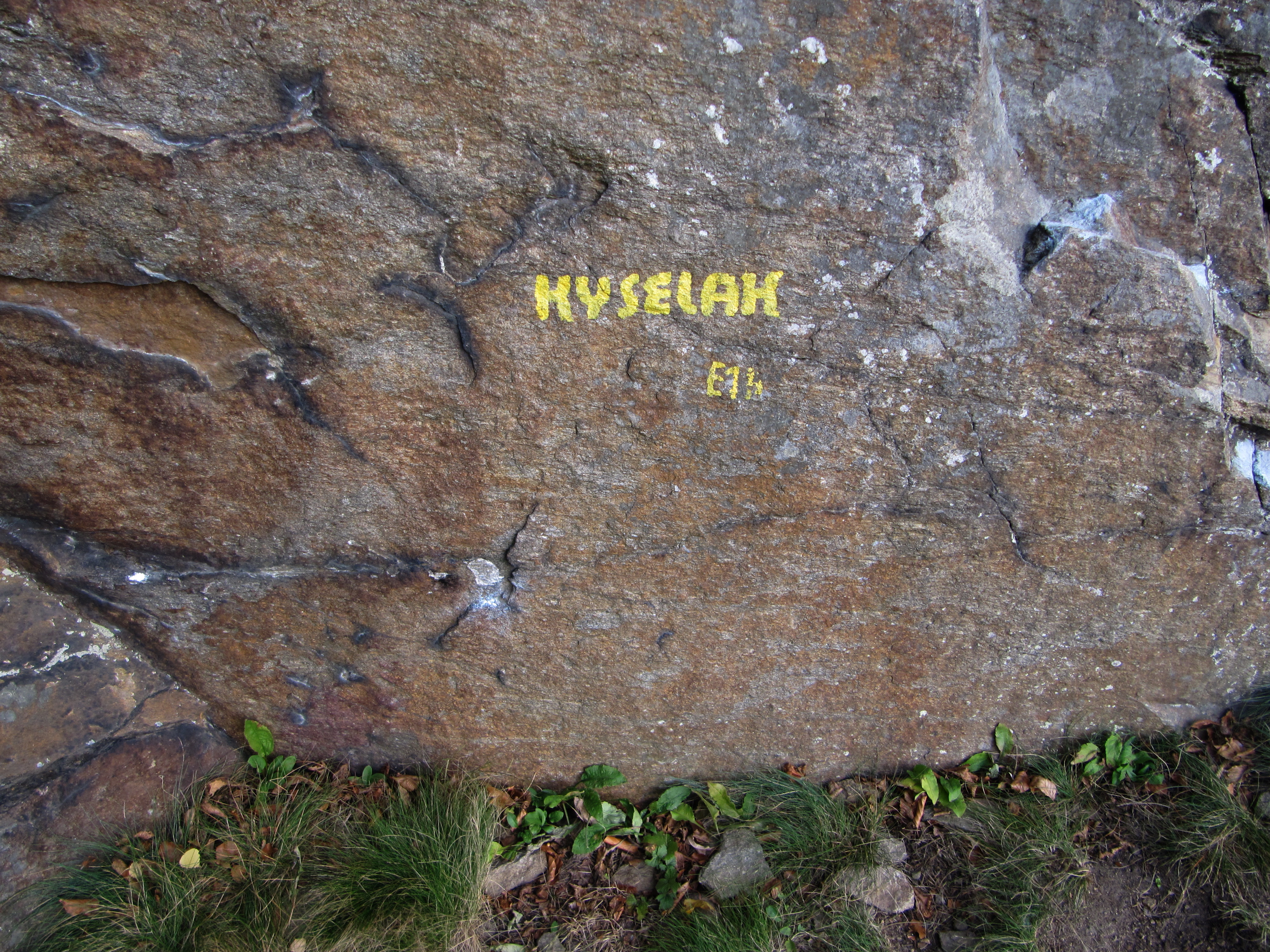 Kyselak in Aggstein